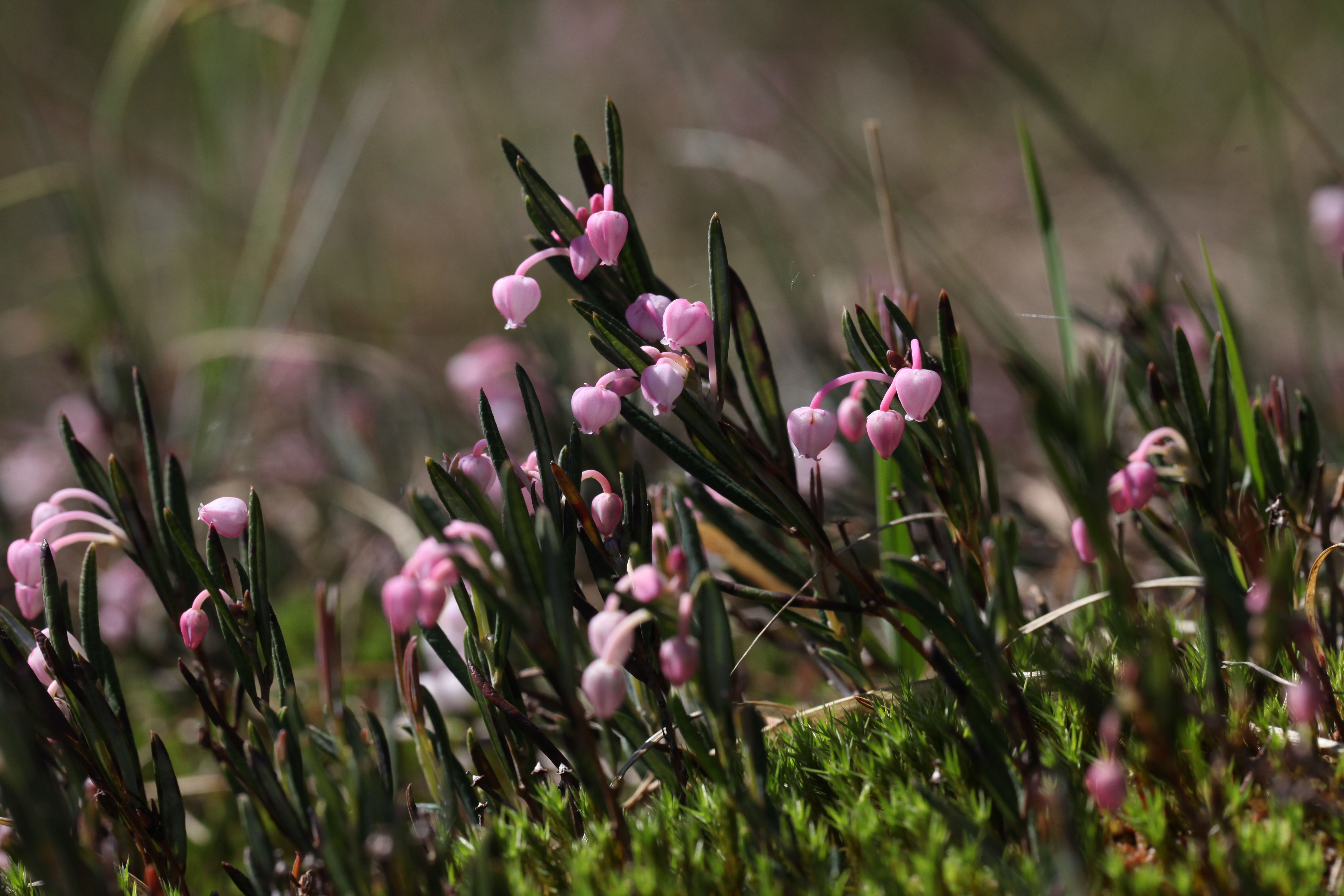 L'Andromède est une plante des tourbières. Elle fait partie des espèces végétales protégées sur l'ensemble du territoire français métropolitain.